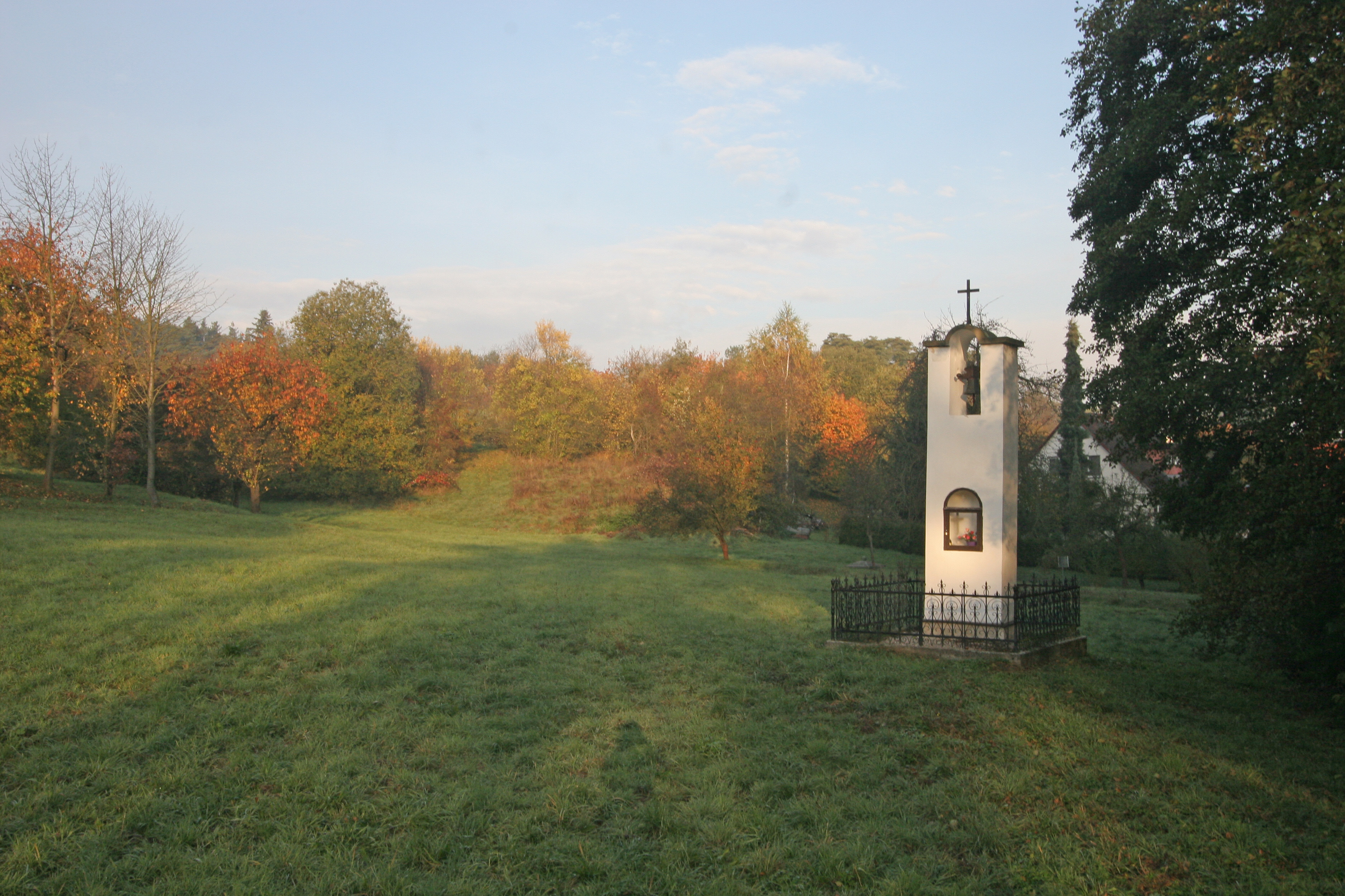 Zvonička v Konopáči